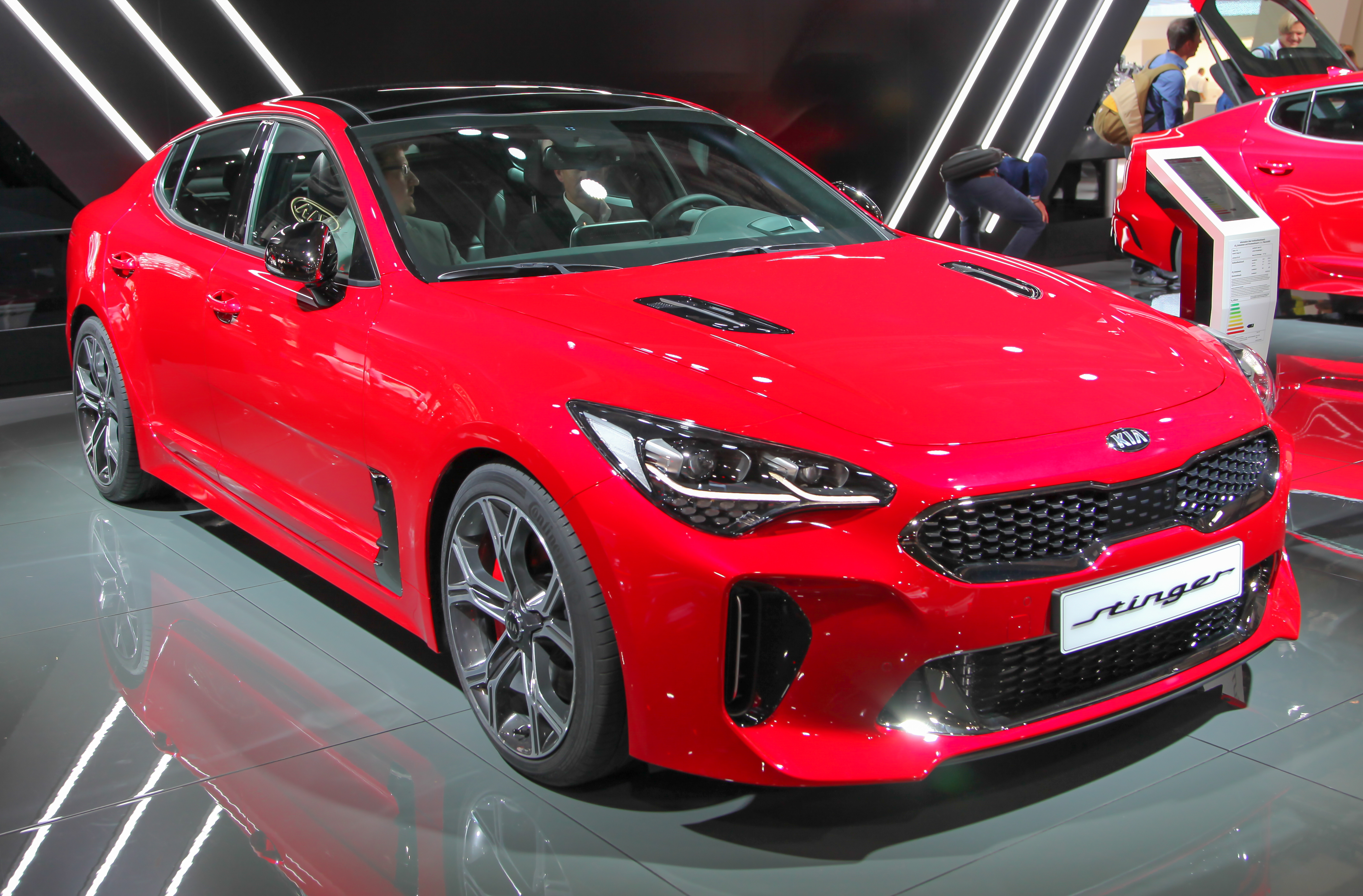 Kia Stinger